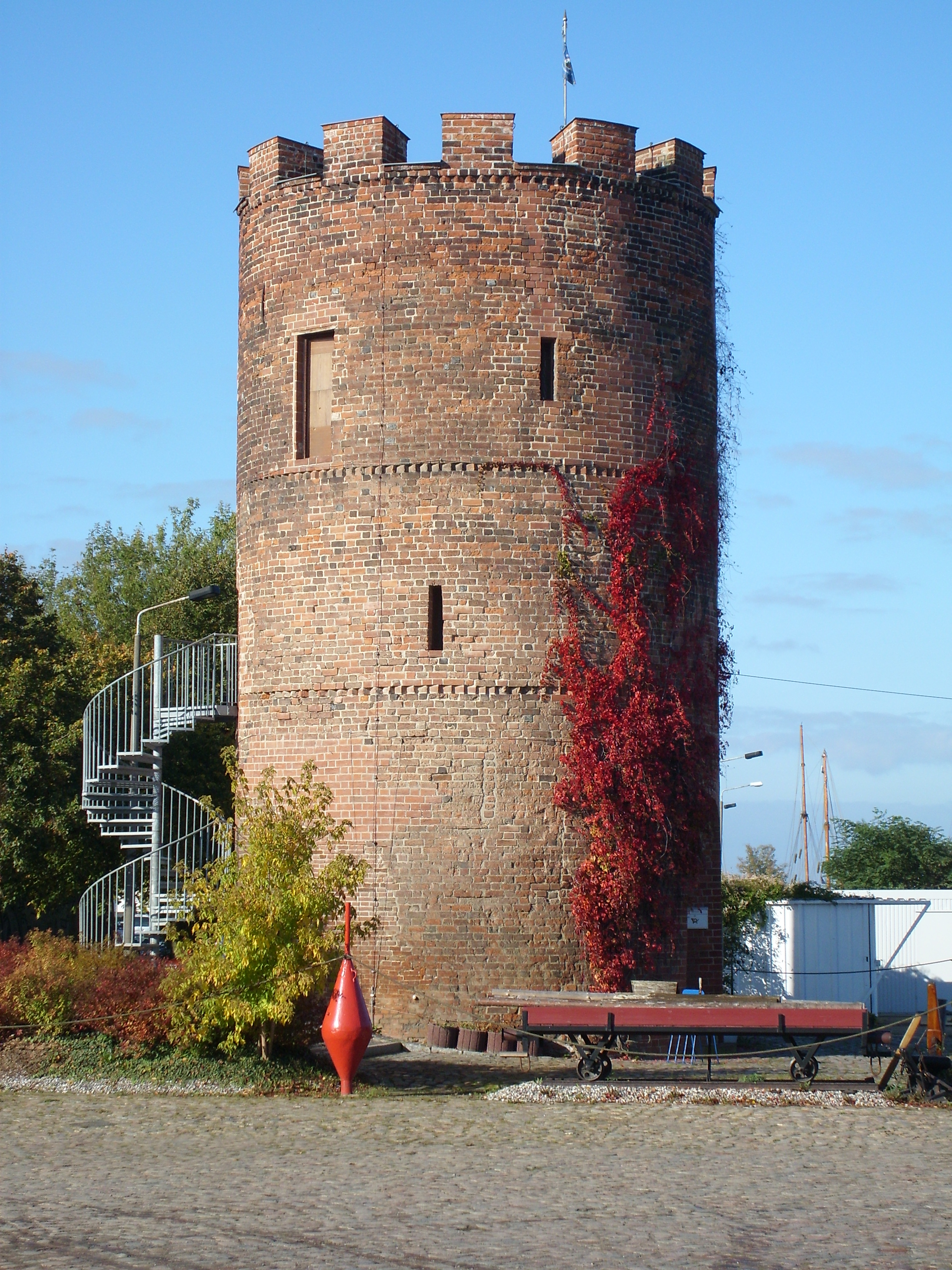 Der Greifswalder Fangenturm von 1270/1280 (restauriert) - Überrest der historischen Stadtmauer